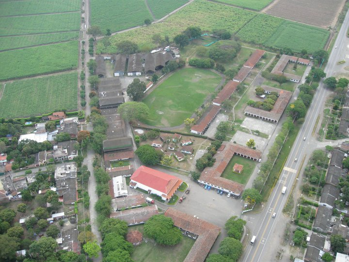 Vista del Centro de formación integral Providencia o simplemente Colegio Providencia.